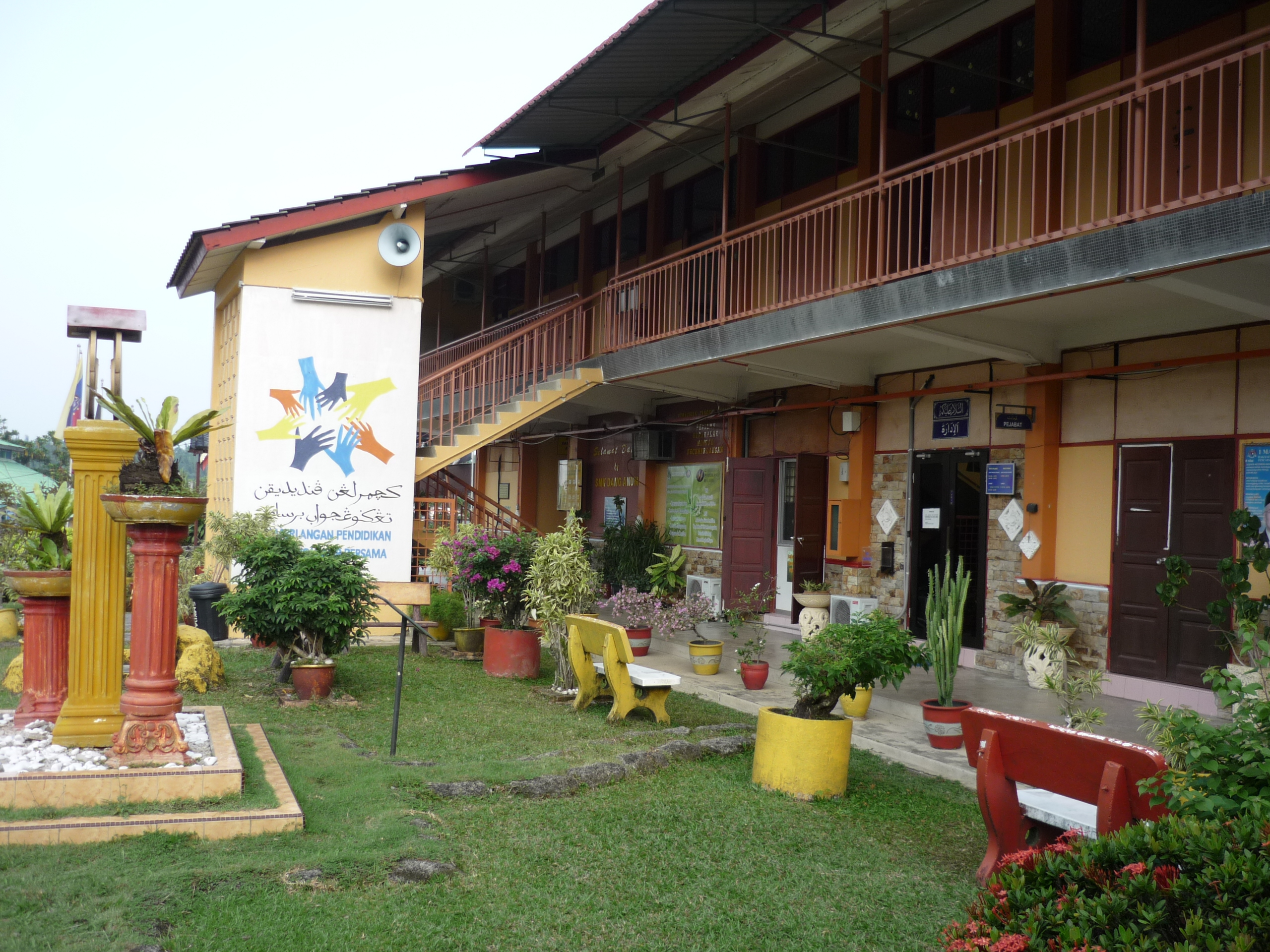 Bangunan Pejabat dan Bilik Darjah